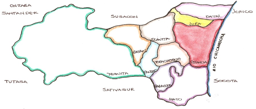 Mapa que muestra los limites y veredas del municipio de Sativanorte, Boyaca, Colombia.